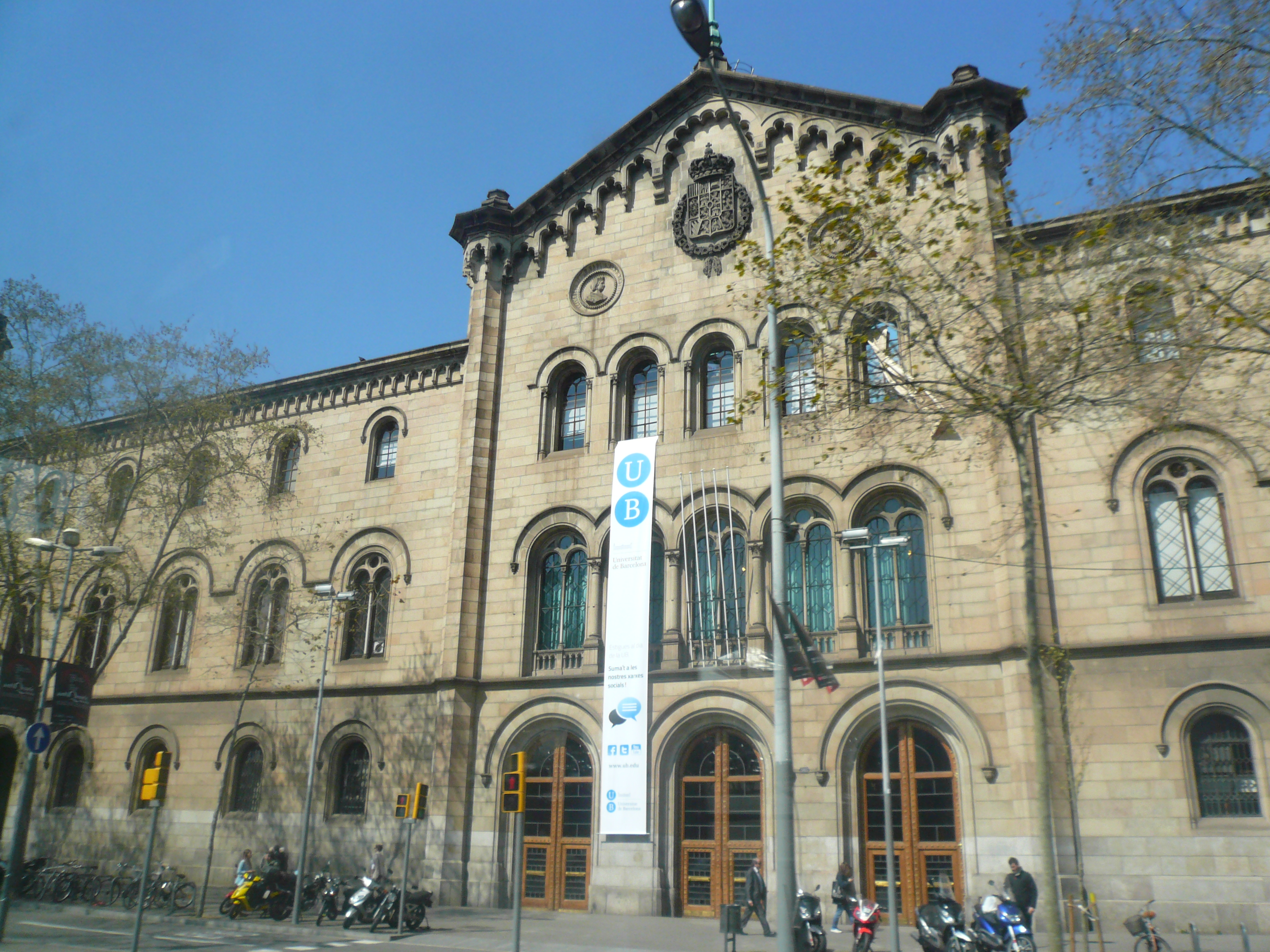 Edifici de la Universitat. Gran Via de les Corts Catalanes, 585 (Barcelona). Object location41° 23′ 11.76″ N, 2° 09′ 50.03″ E